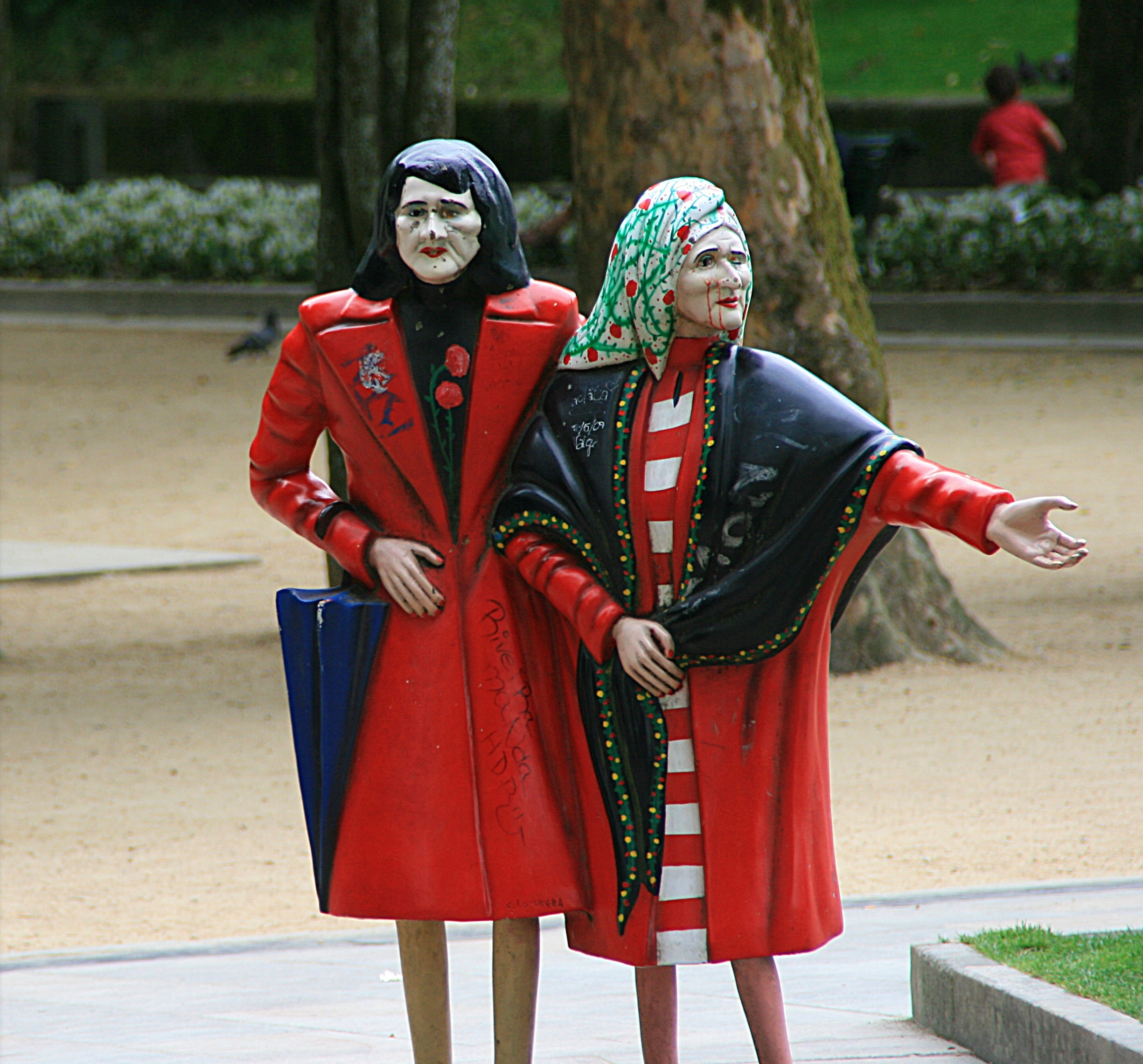 Las Marías, Las Dos Marías, o Las Dos en Punto es el nombre con que se conocía en Santiago de Compostela (Galicia) a la pareja formada por las hermanas Maruxa Fandiño Ricart (Santiago, 4 de enero de 1898 - Santiago, 13 de mayo de 1980) y Coralia Fandiño Ricart (Santiago, 24 de agosto de 1914 - La Coruña, 30 de enero de 1983), representadas desde hace varios años en una famosa escultura ubicada en el parque de la Alameda, en Santiago de Compostela.